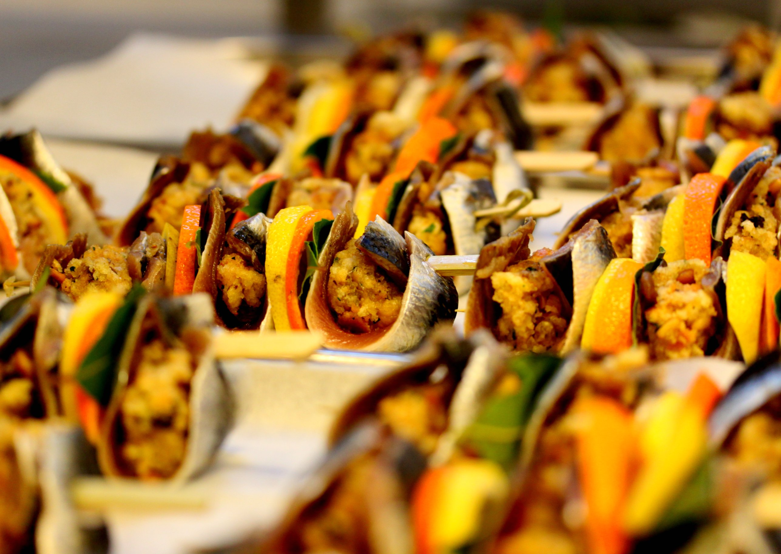 Spiedini di sarde a beccafico